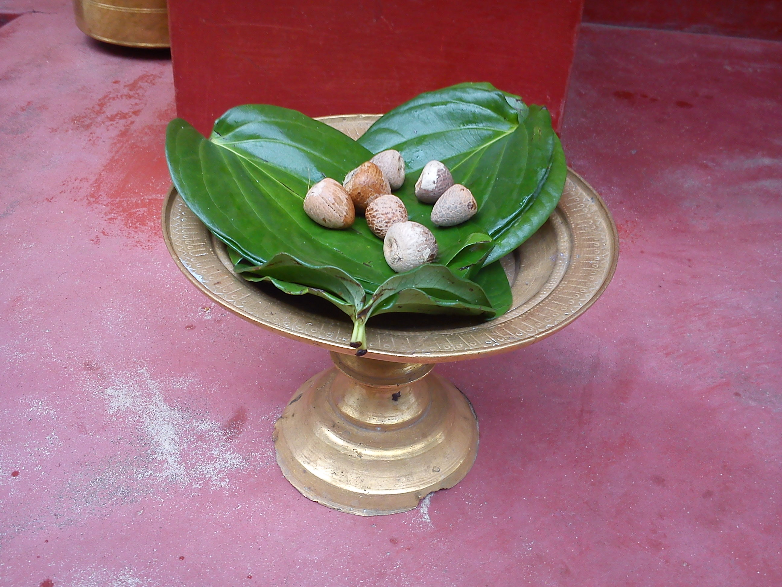 வெற்றிலைத் தட்டு, பாக்கு வெற்றிலையுடன்